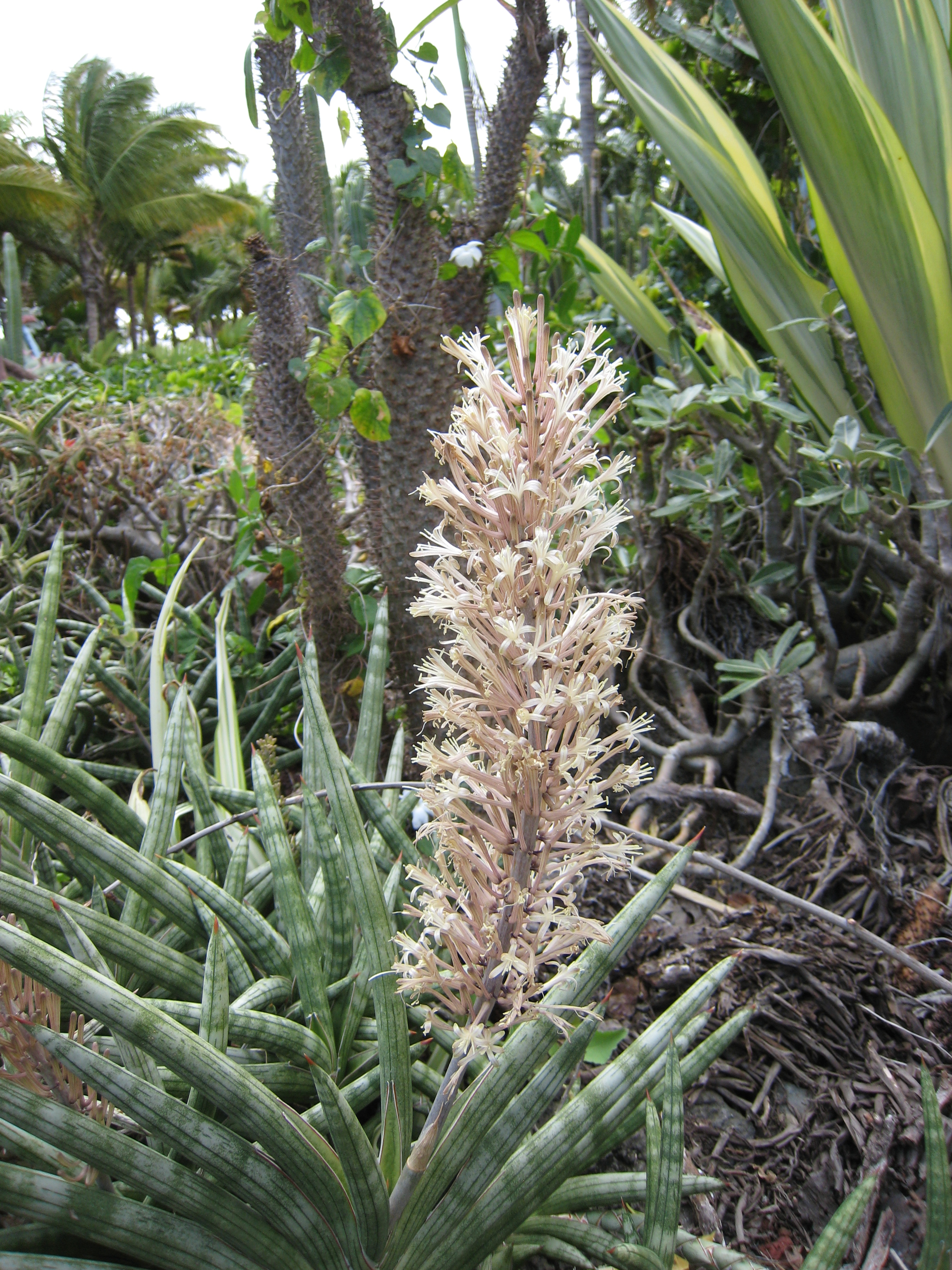 Probablement Sansevieria suffruticosa 'Frosty Spears au Parc Exotica.